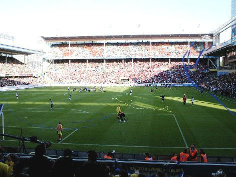 Råsunda fotbollsstadion i Solna, Sverige under träningslandskampen Sverige-Chile (1-1). 2 juni 2006.